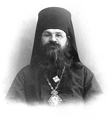 Алексий (в миру Алексей Васильевич Молчанов; 1853-1914)